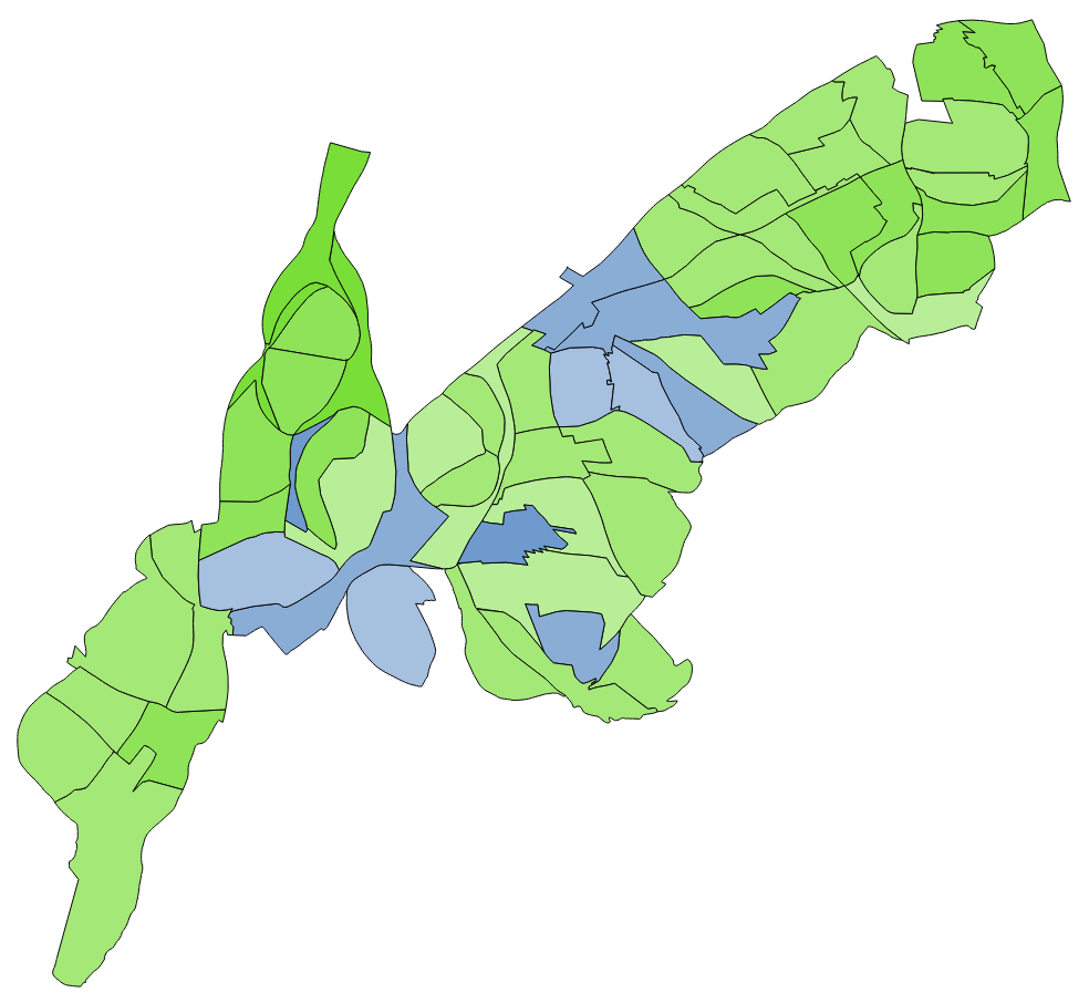 顏色對照表